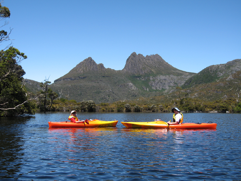 Kayaking on Dove Lake